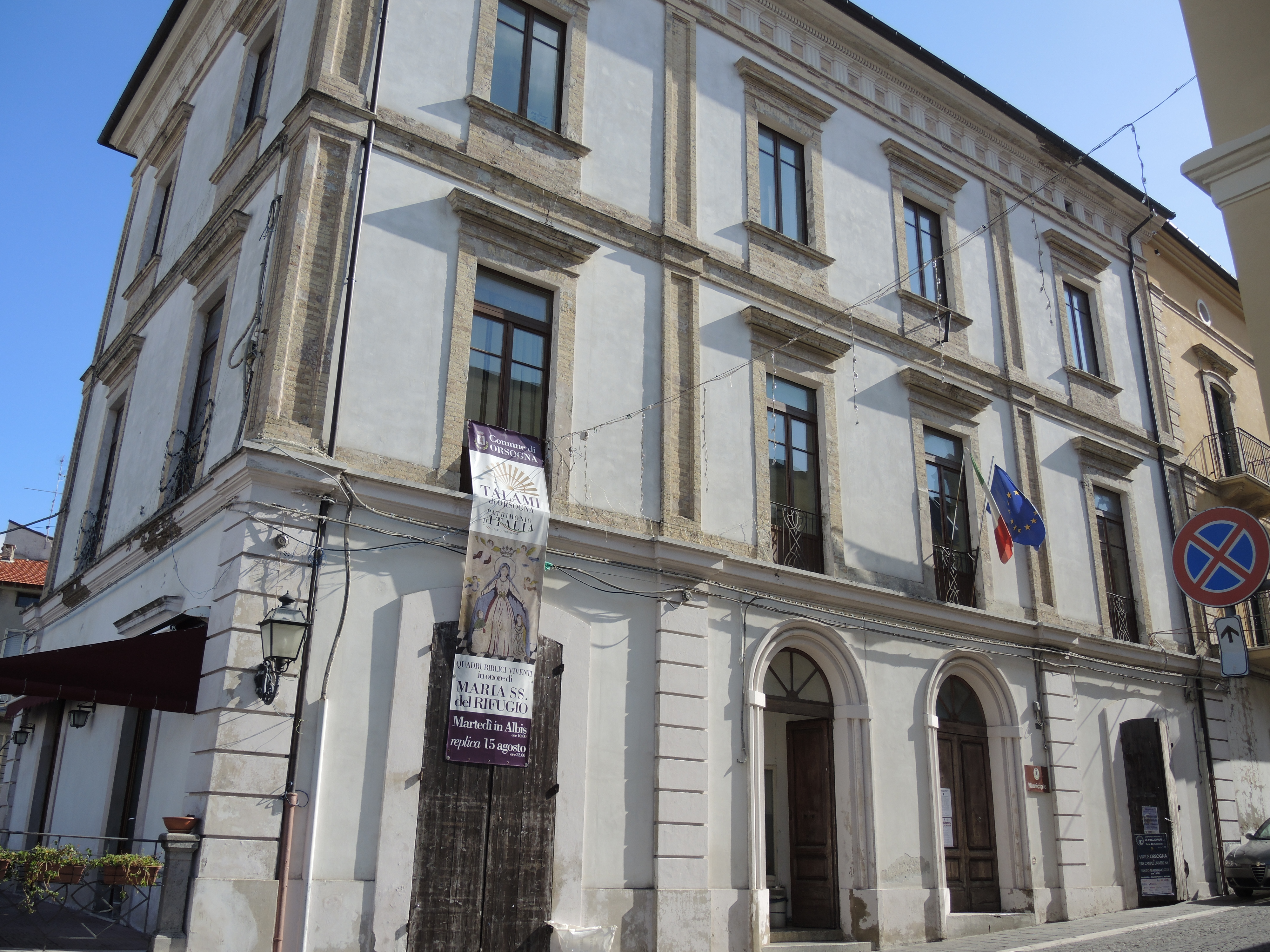 Orsogna: Municipio